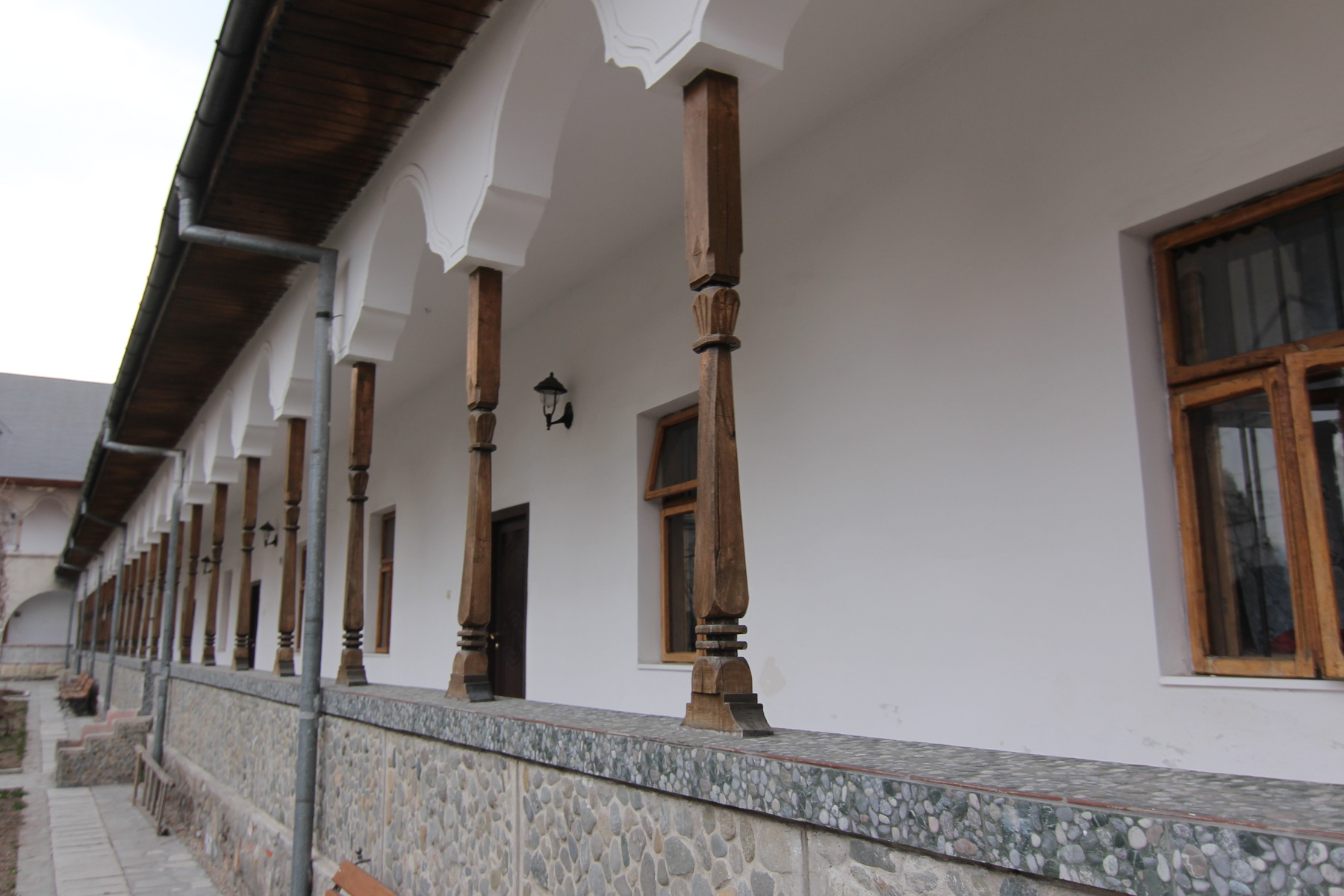 Chilii la Negru Vodă în Câmpulung 06